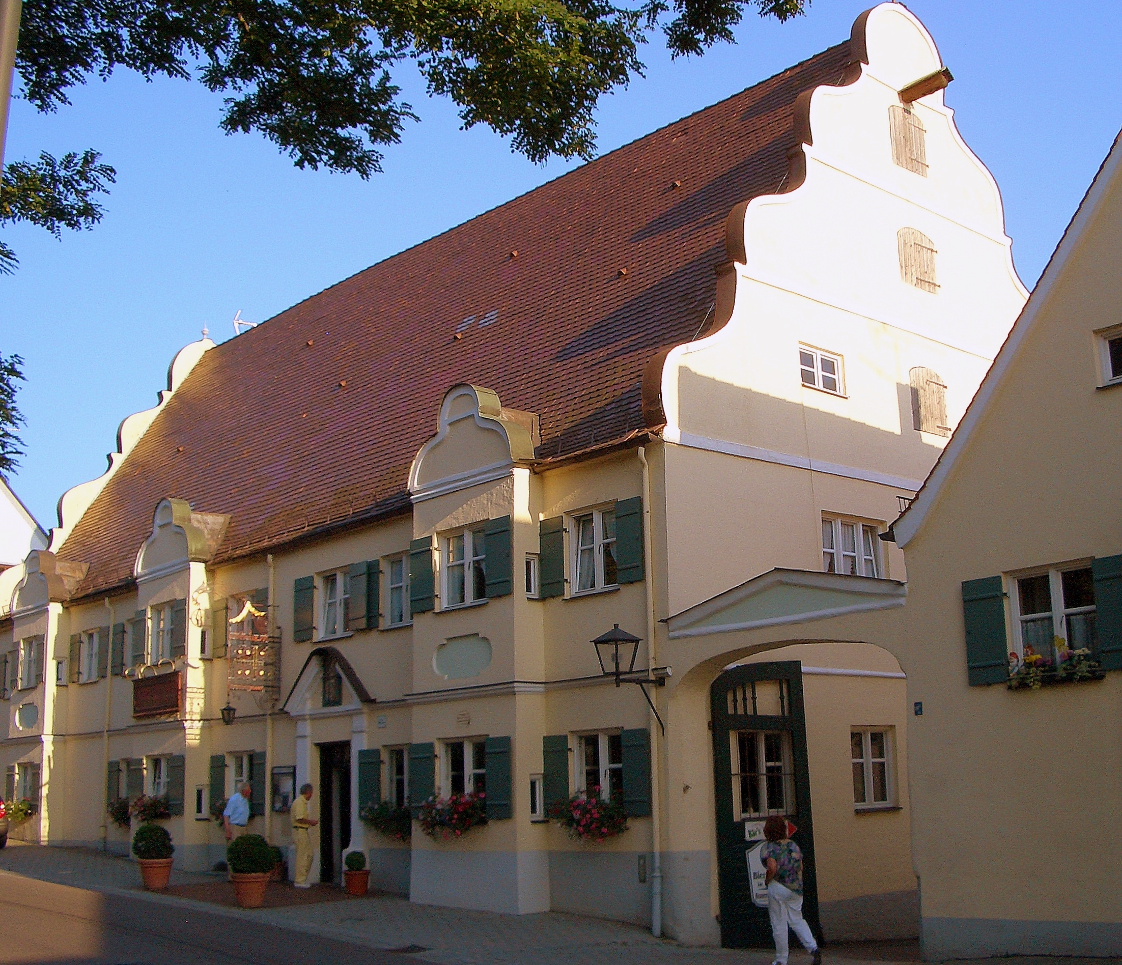 Brauereigasthof Kapplerbräu Altomünster, Oberbayern